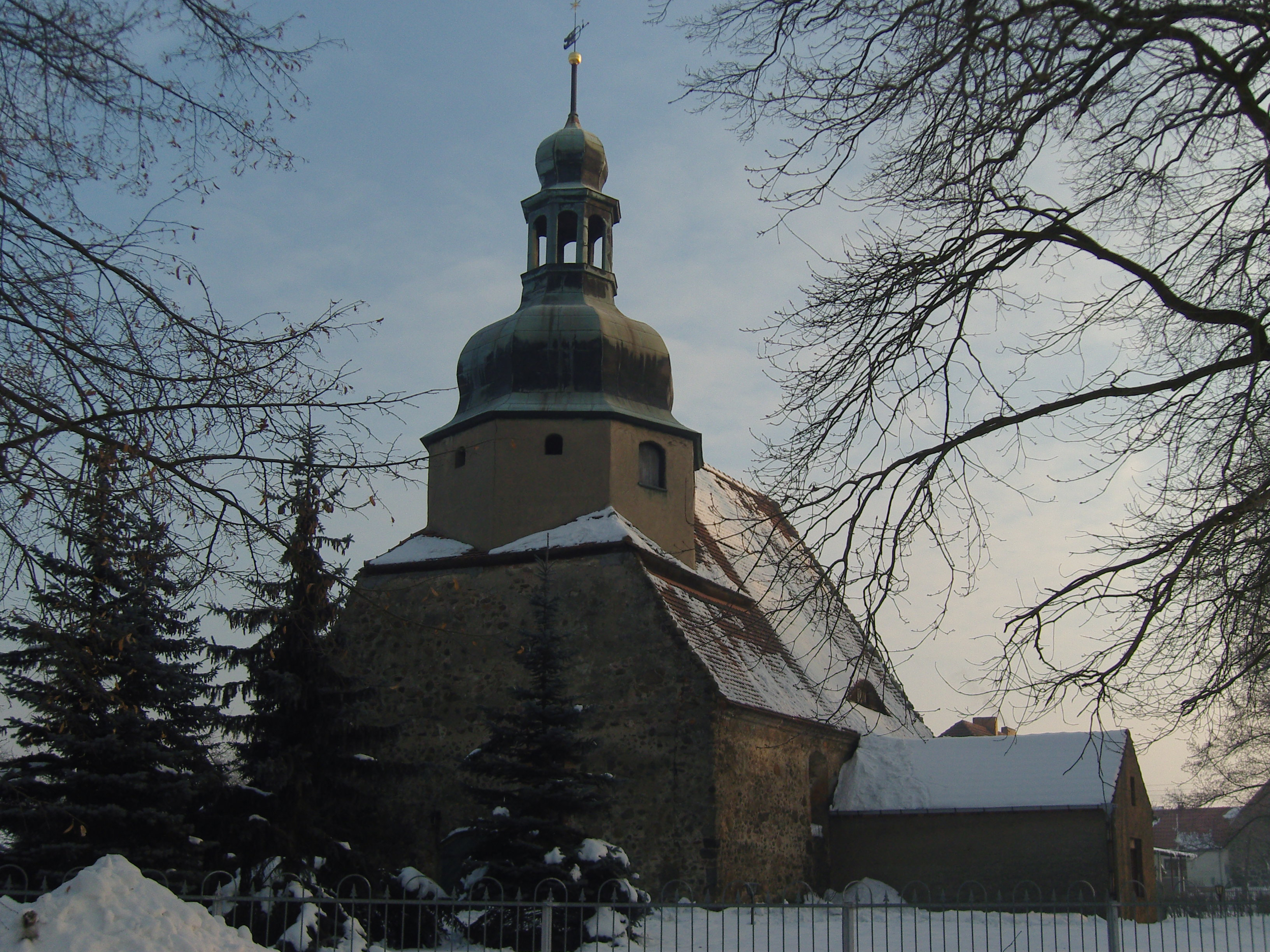 Dorfkirche in Bronkow - Baudenkmal